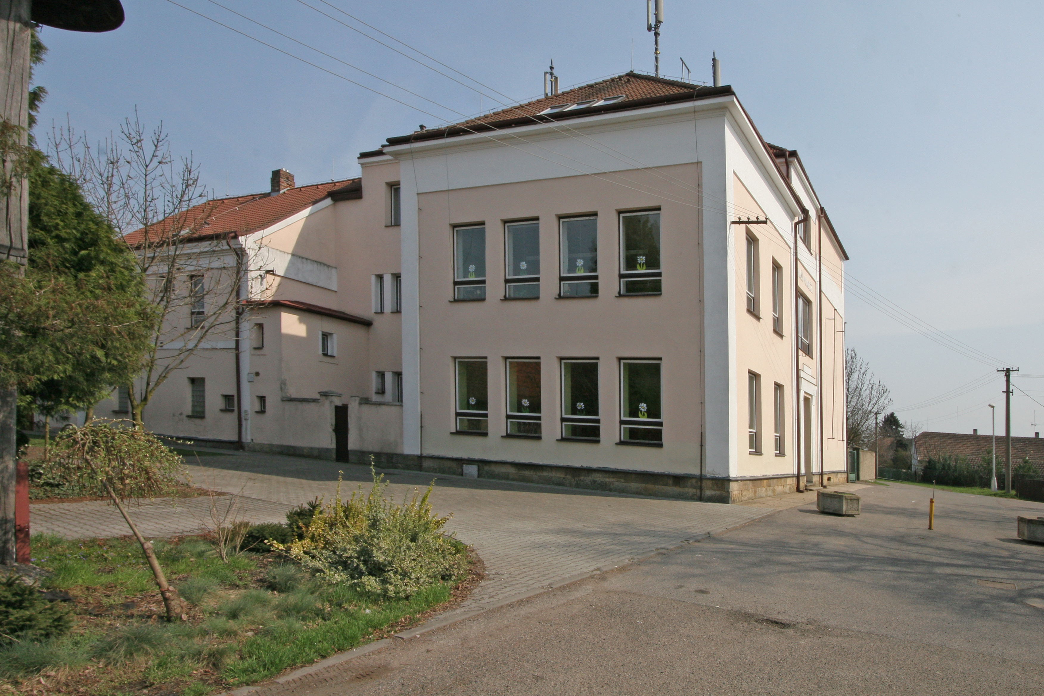 Nové Město nad Cidlinou škola